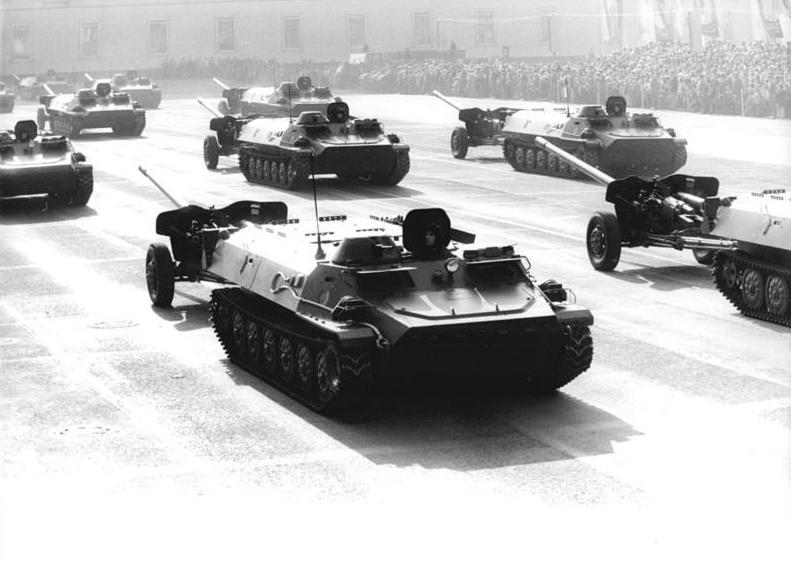 Berlin, 28. Jahrestag DDR-Gründung, Parade ADN-ZB Busch 7.10.77 Berlin: Ehrenparade Eine eindrucksvolle Ehrenparade der NVA fand am Nationalfeiertag der DDR auf dem Berliner Marx-Engels-Platz statt. Eine Panzerjägerabteilung mit 100-mm Panzerabwehrkanonen hinter schwimmfähigen leichten Kettenzugmitteln - erstmals bei einer Parade der NVA vorgestellt - bildete die erste Formation der Artilleristen. [Berlin.- Schützenpanzer MT-LB PBV-401 mit angehängter Panzerabwehrkanone (Pak)]